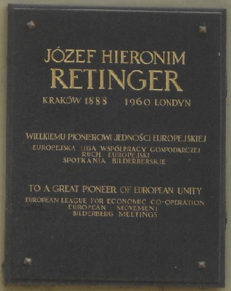 Tablica Pamiątkowa, upamiętniajaca Józefa Hieronima Retingera.